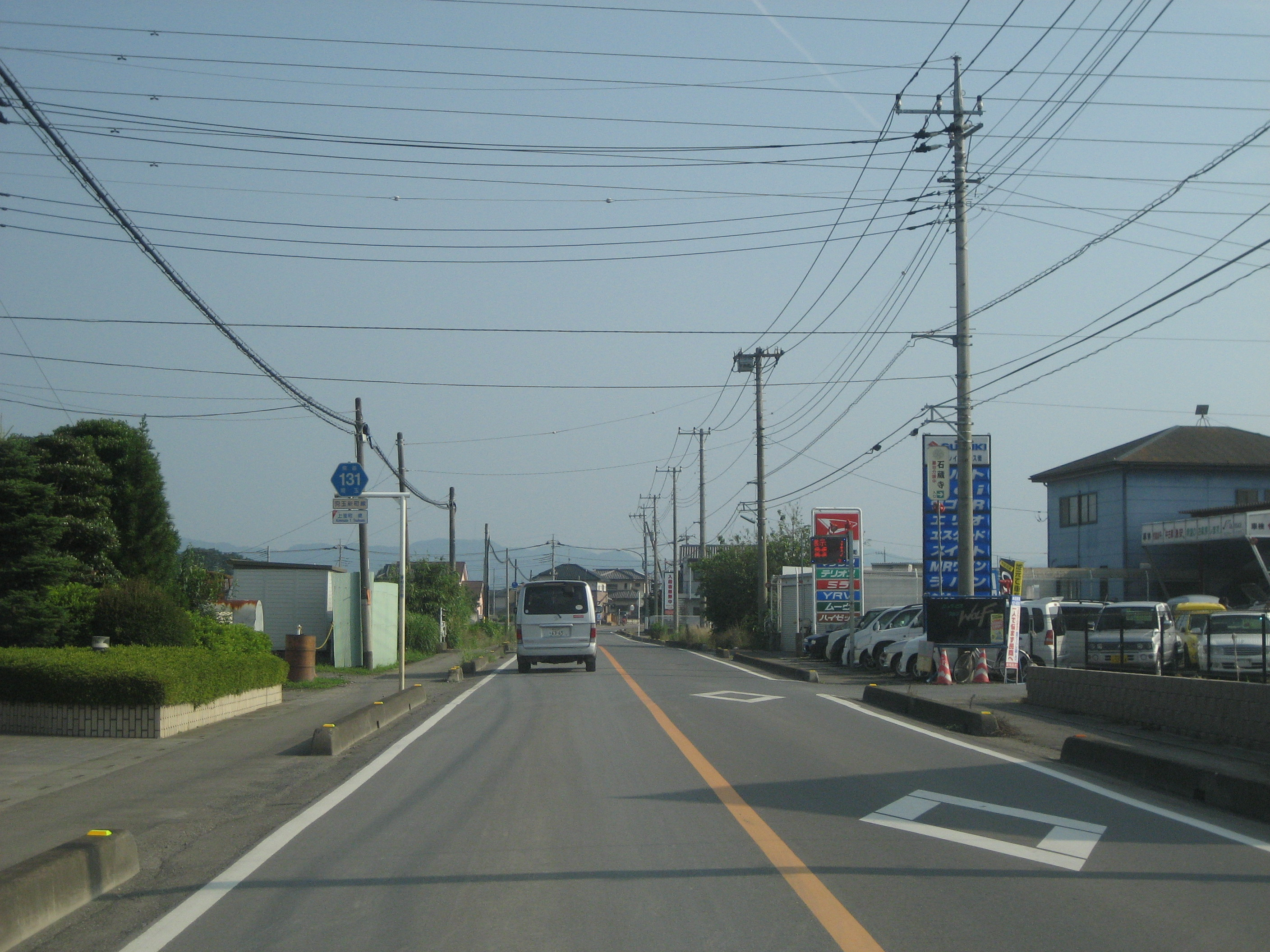 埼玉県道131号線上里町内